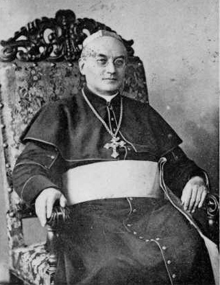 Thomas Nörber (1846-1920, ehemaliger Erzbischof von Freiburg)